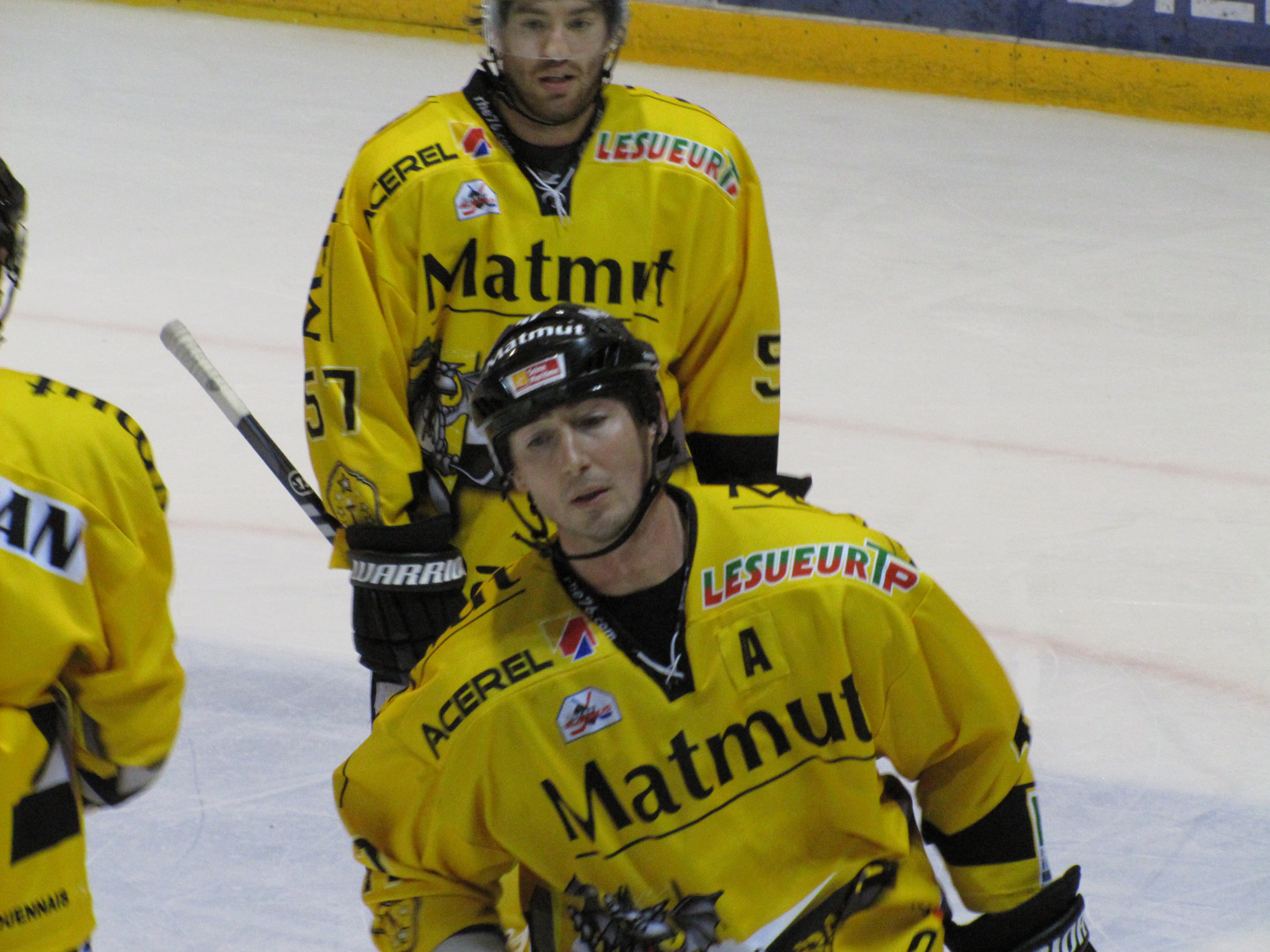 Darcy Werenka lors de la Coupe Continentale 2012